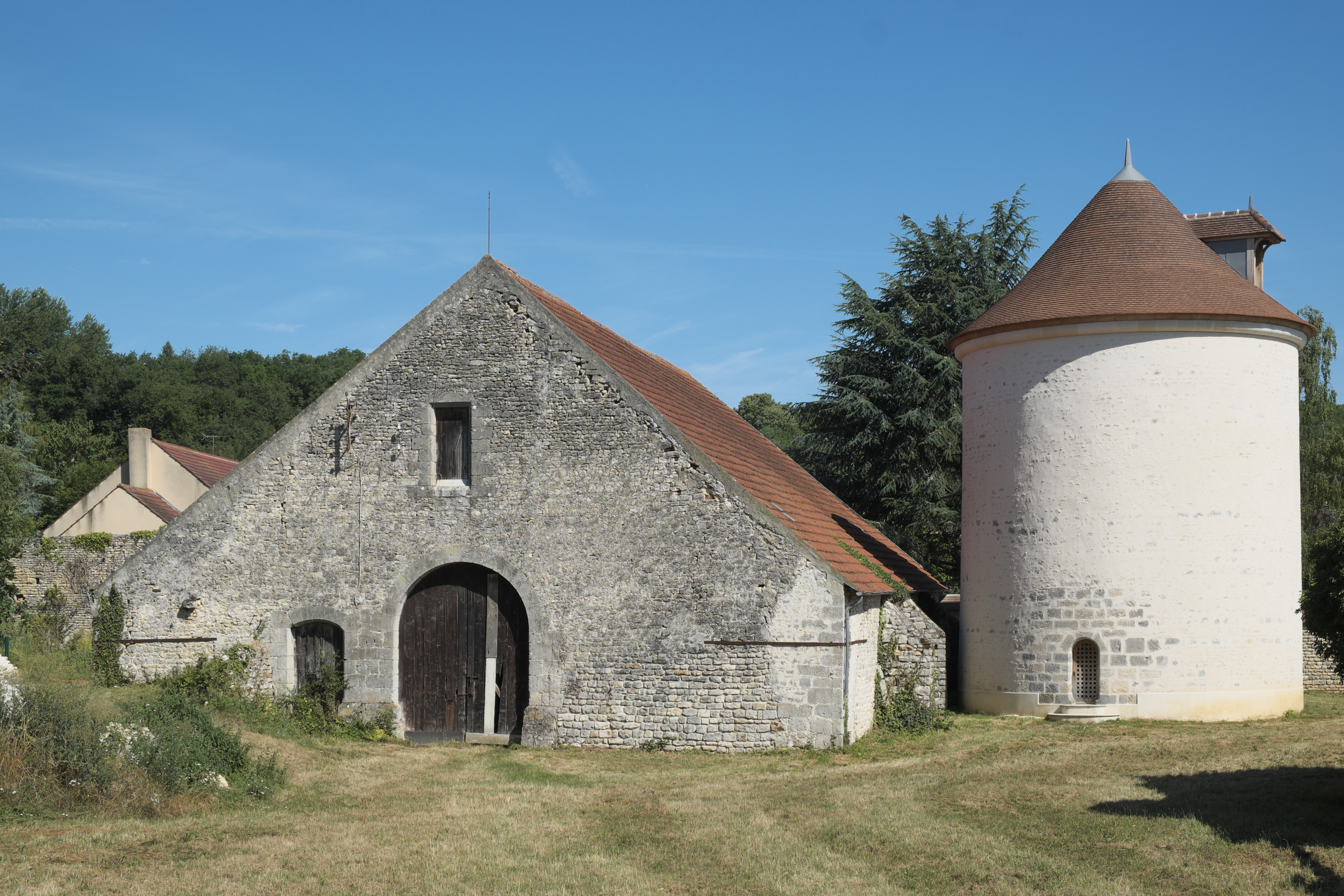 Zehntscheune und Taubenturm in Brières-les-Scellés im Département Essonne (Île-de-France/Frankreich)